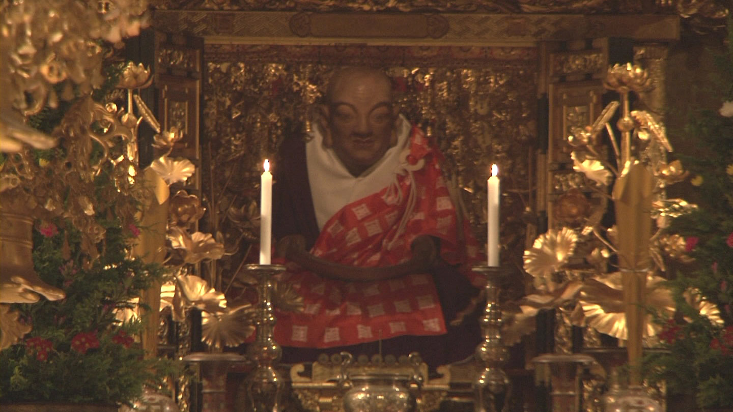 身延山久遠寺祖師堂